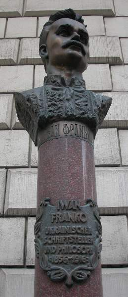 Denkmal für Iwan Franko (Wien, Postgasse)